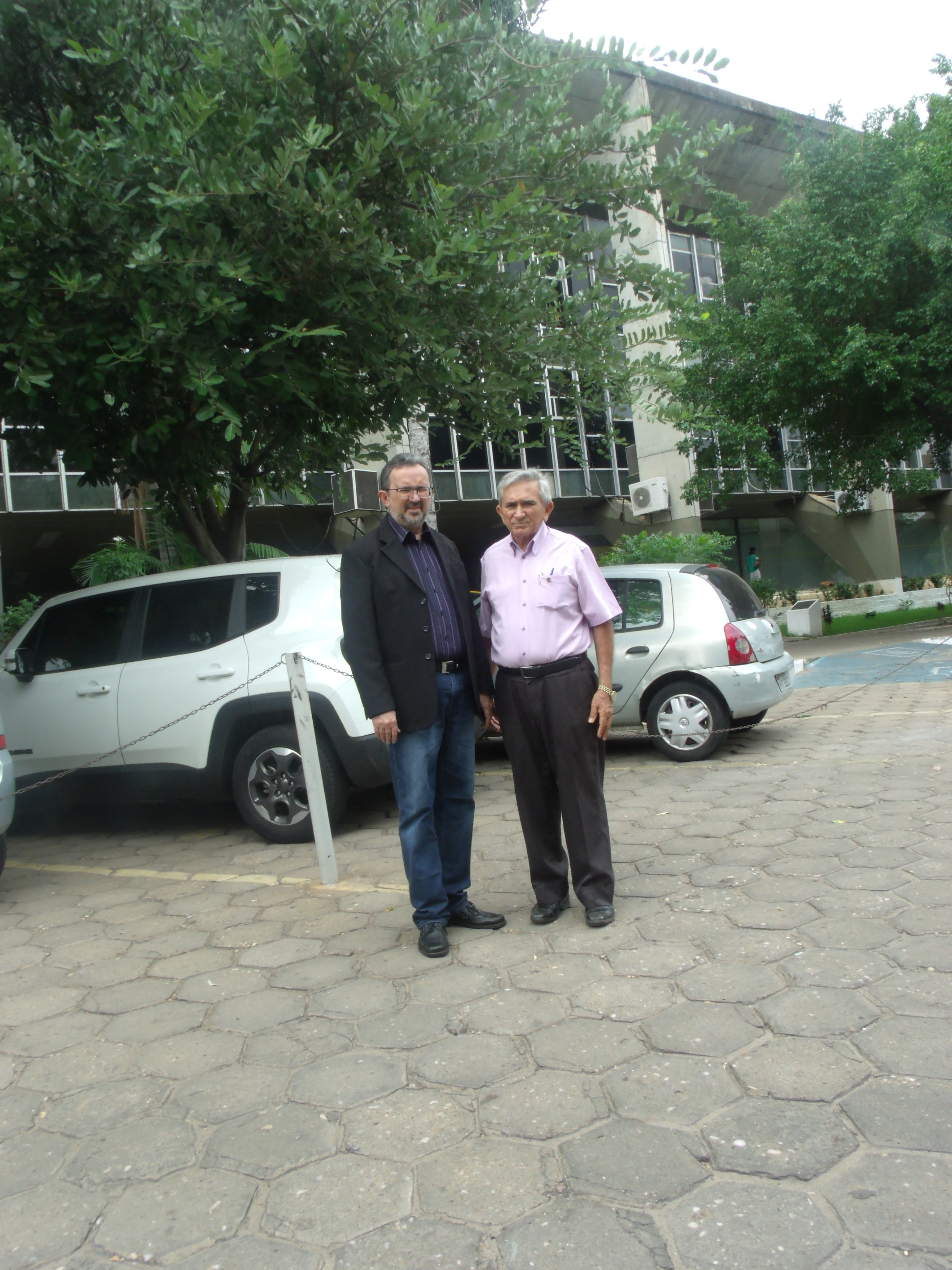 O deputado estadual Antônio Félix e o ex-vice-prefeito de Campo maior, João Alves Filho, presidente da Academia campomaiorense de Letras.